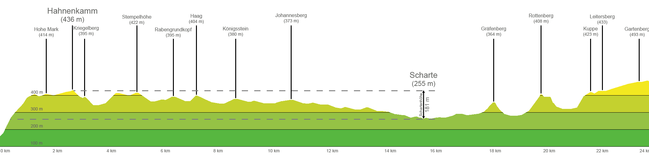 Längsschnitt des Hahnenkamms mit Schartenhöhe und Bezugsscharte Höhen über 400 m Höhen über 300 m Höhen über 200 m Höhen über 100 m